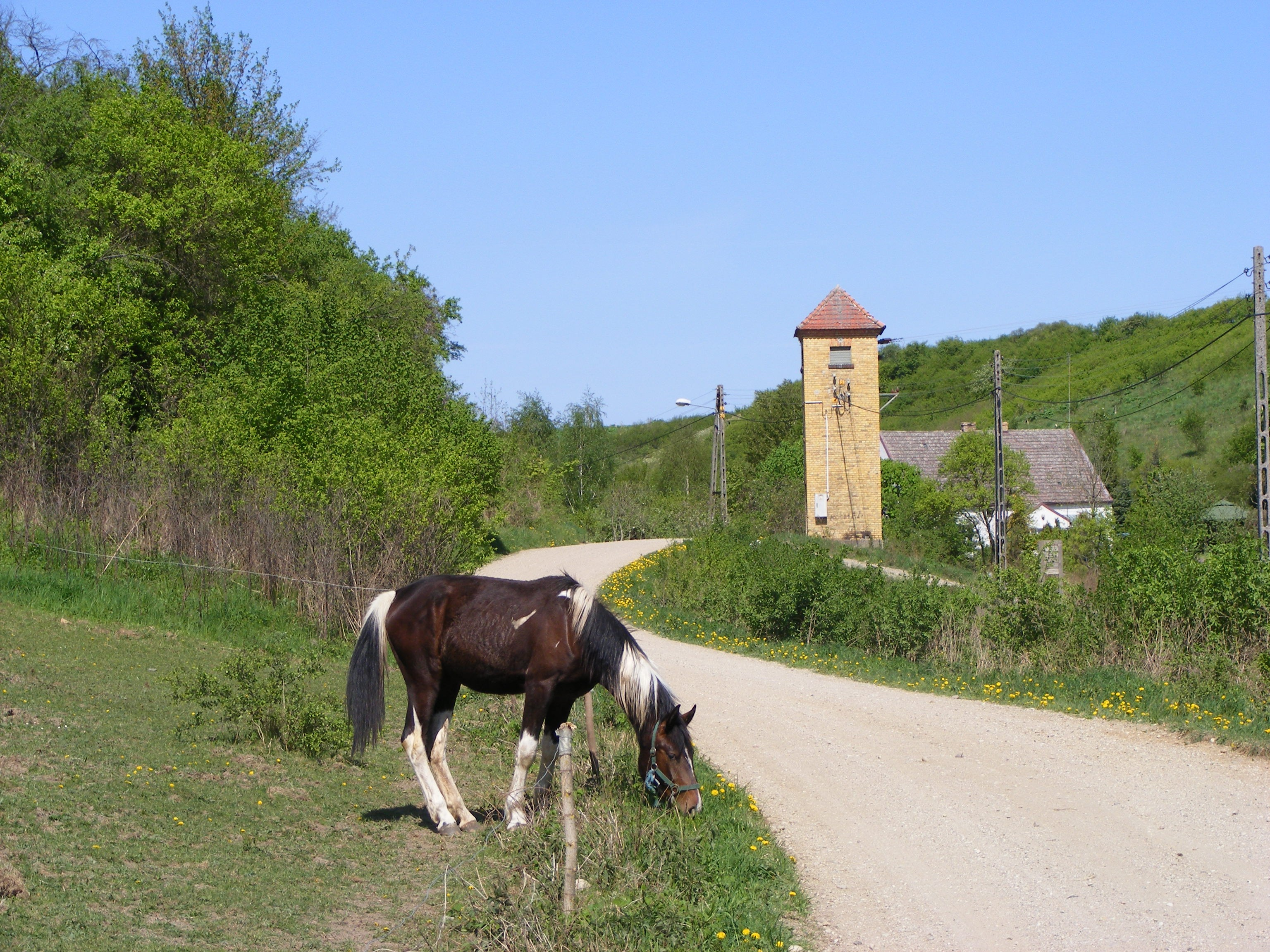 Górki - gmina Santok